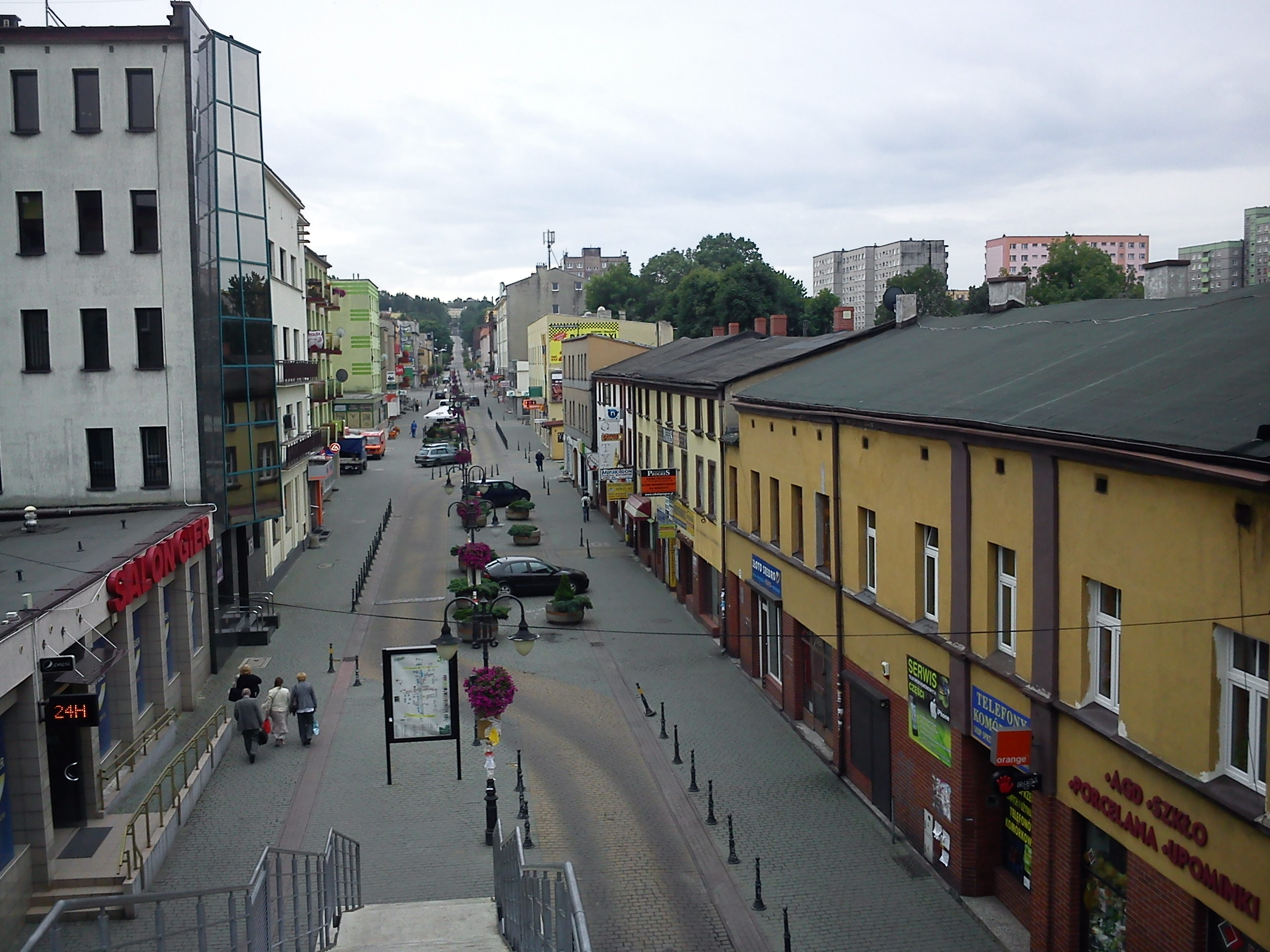 Dąbrowa Górnicza-Ulica 3 Maja.